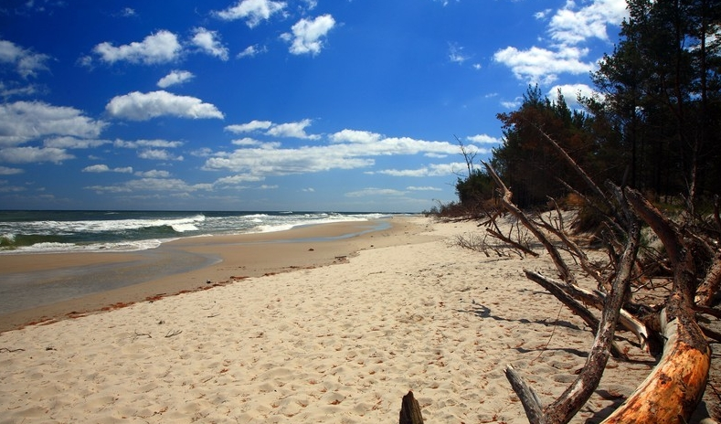 Jurata